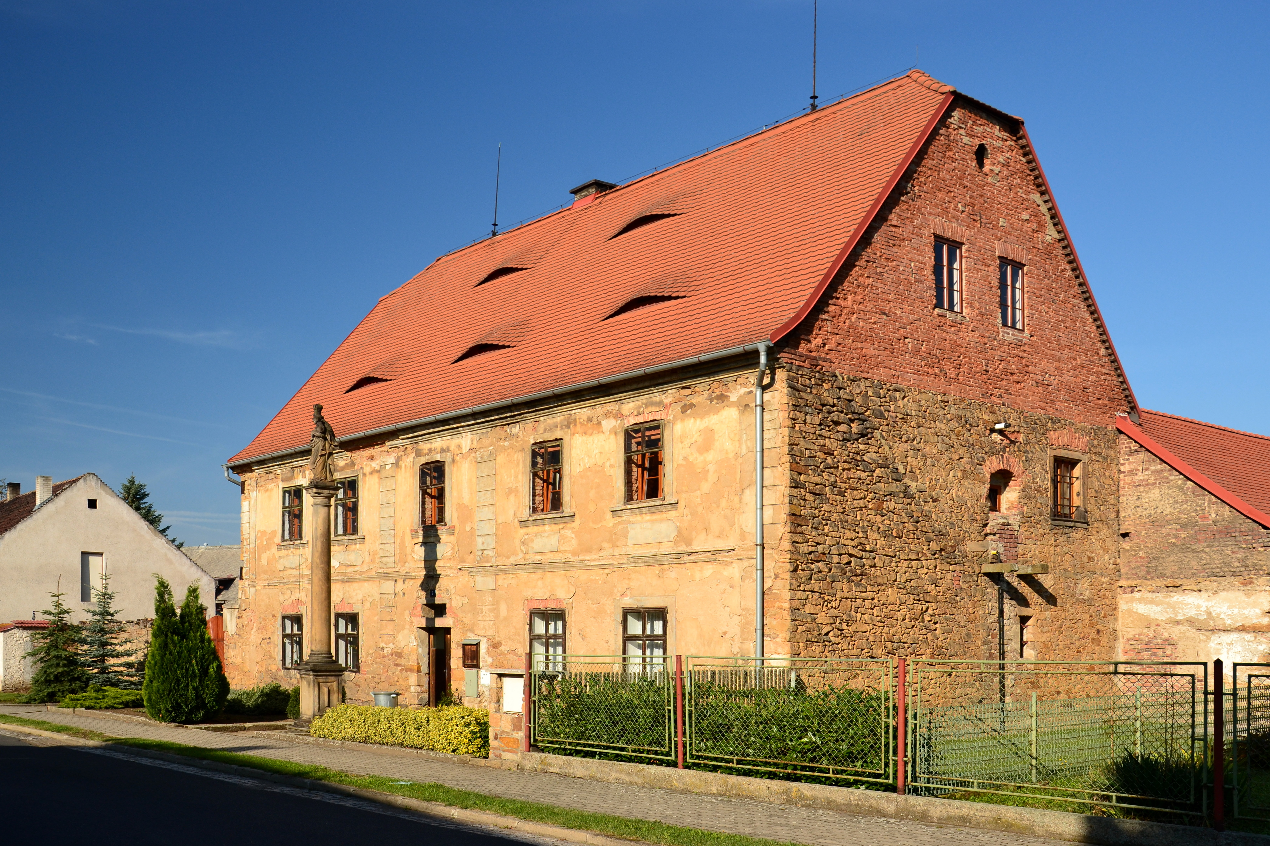 Venkovská usedlost se sloupem a sochou Panny Marie